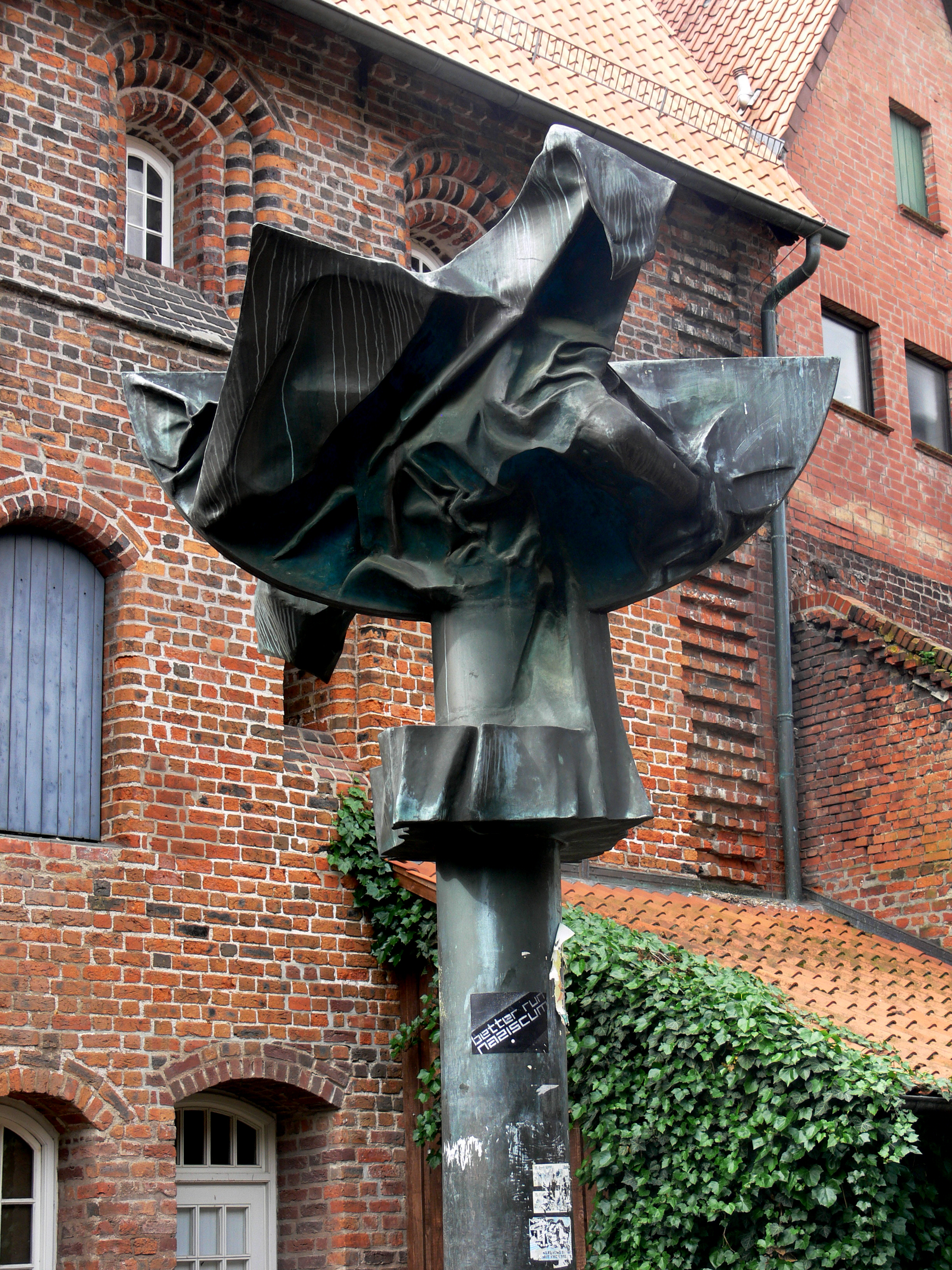 Lüneburg, Glockenhof Lunasäule von Erich Brüggemann (aus Stockte), 1977